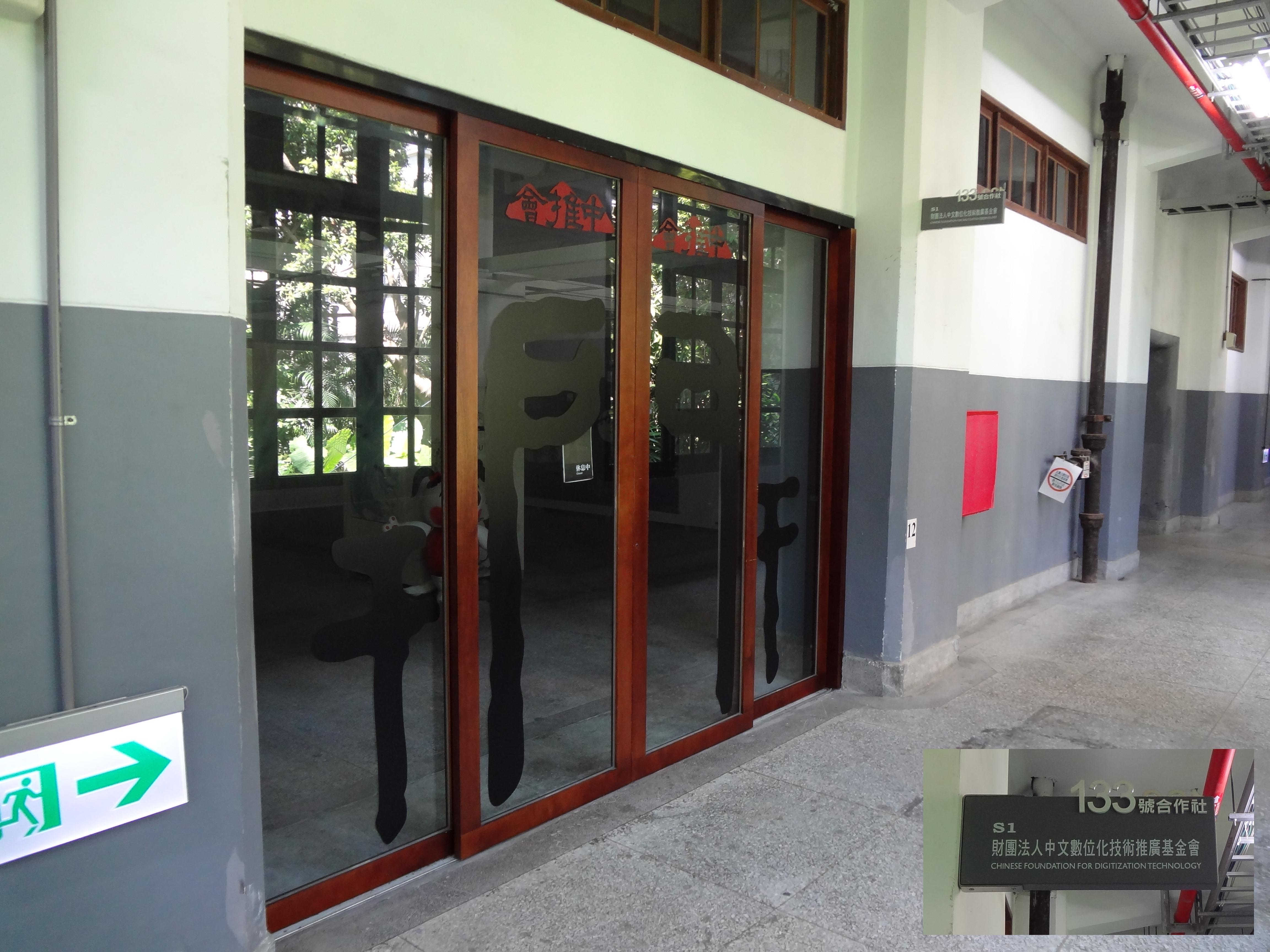 中文數位化技術推廣基金會松山文化創意園區辦公室，位於松山文化創意園區133號合作社S1室。